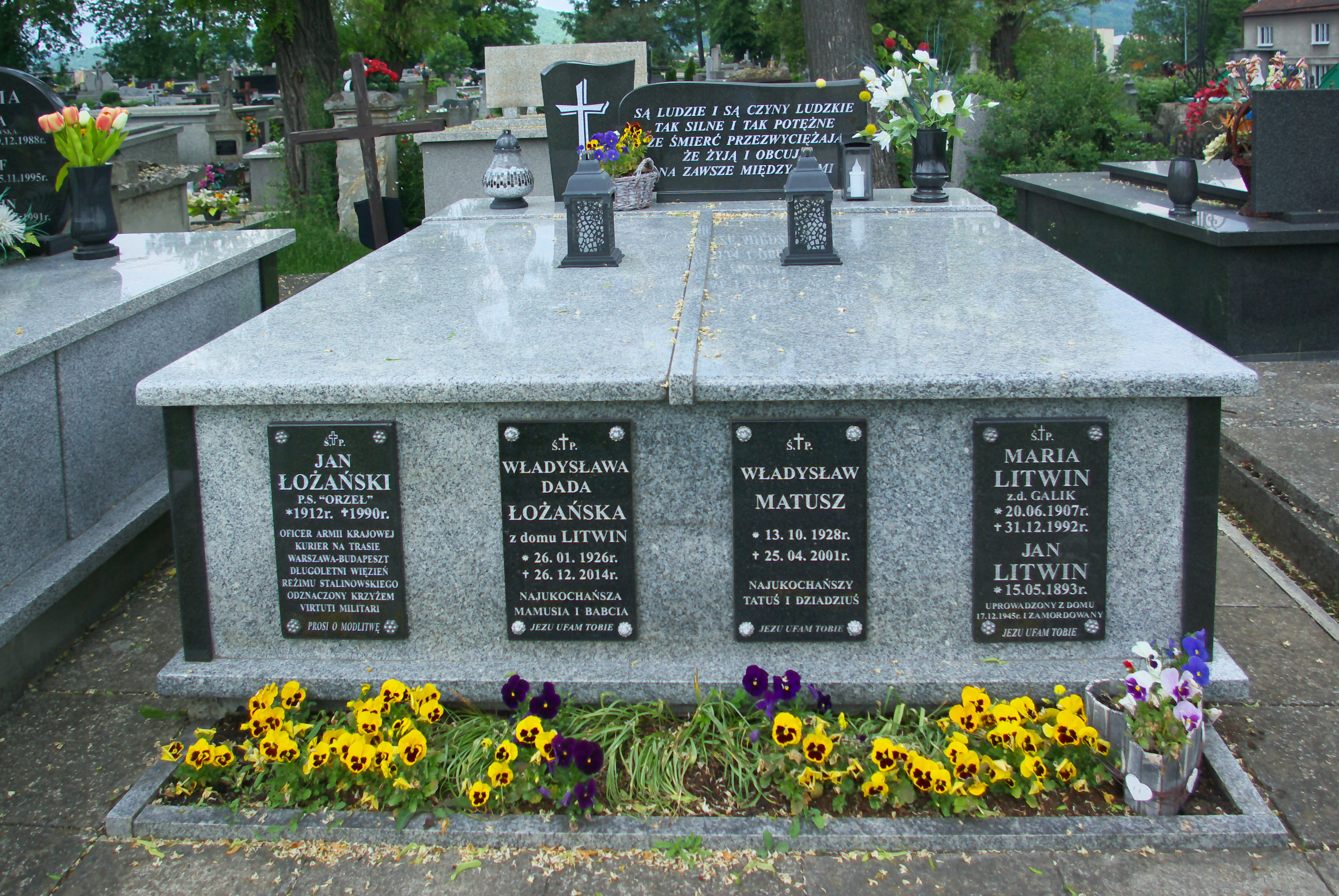 Grobowiec Jana Łożańskiego na Cmentarzu Centralnym w Sanoku.